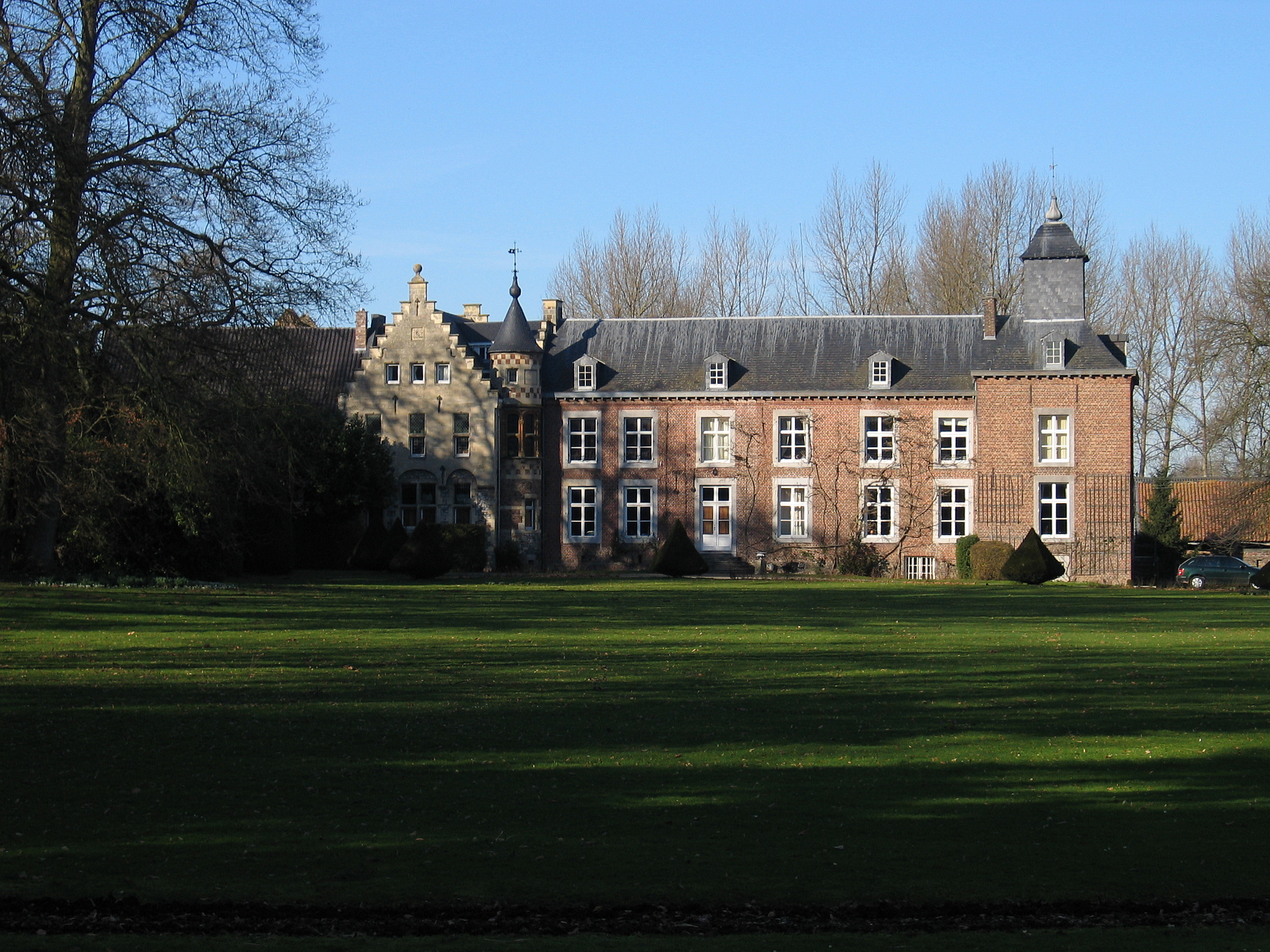 Kasteel Terhove in Bommershoven, Borgloon, België